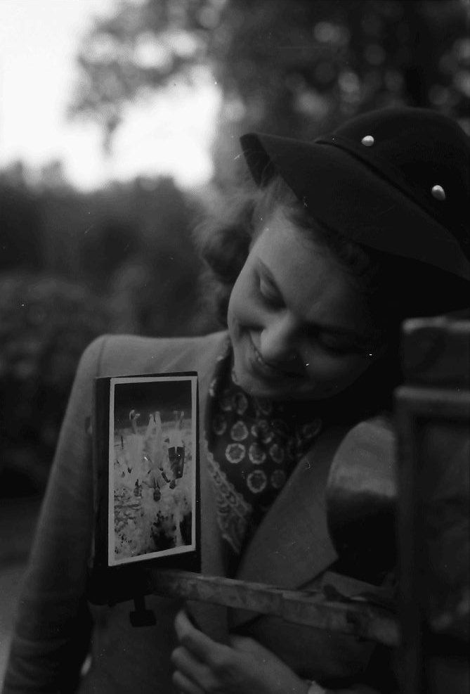 Bukarest: UFA-Truppe, beim Schnellfotograf im Cișmigiu, Bruni Löbel betrachtet Negativ